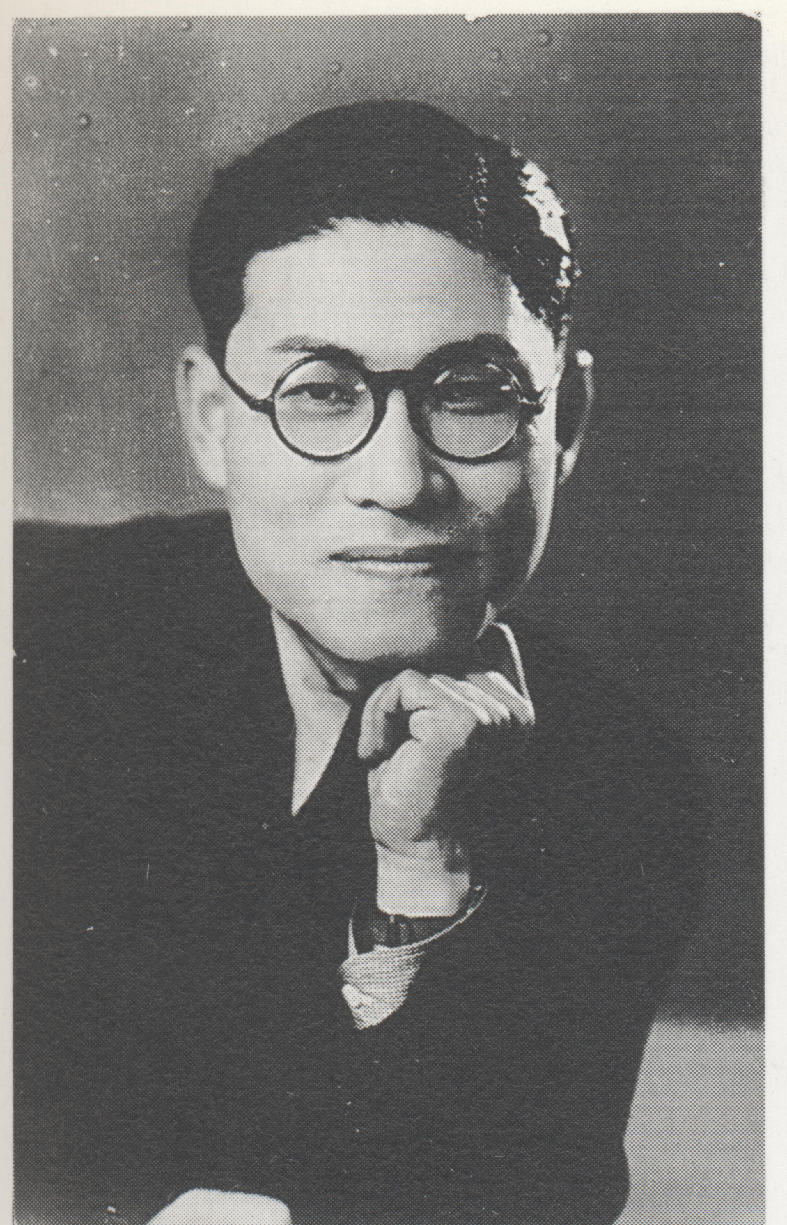 1938年に撮られた塩まさるのスチール写真をスキャナでスキャン